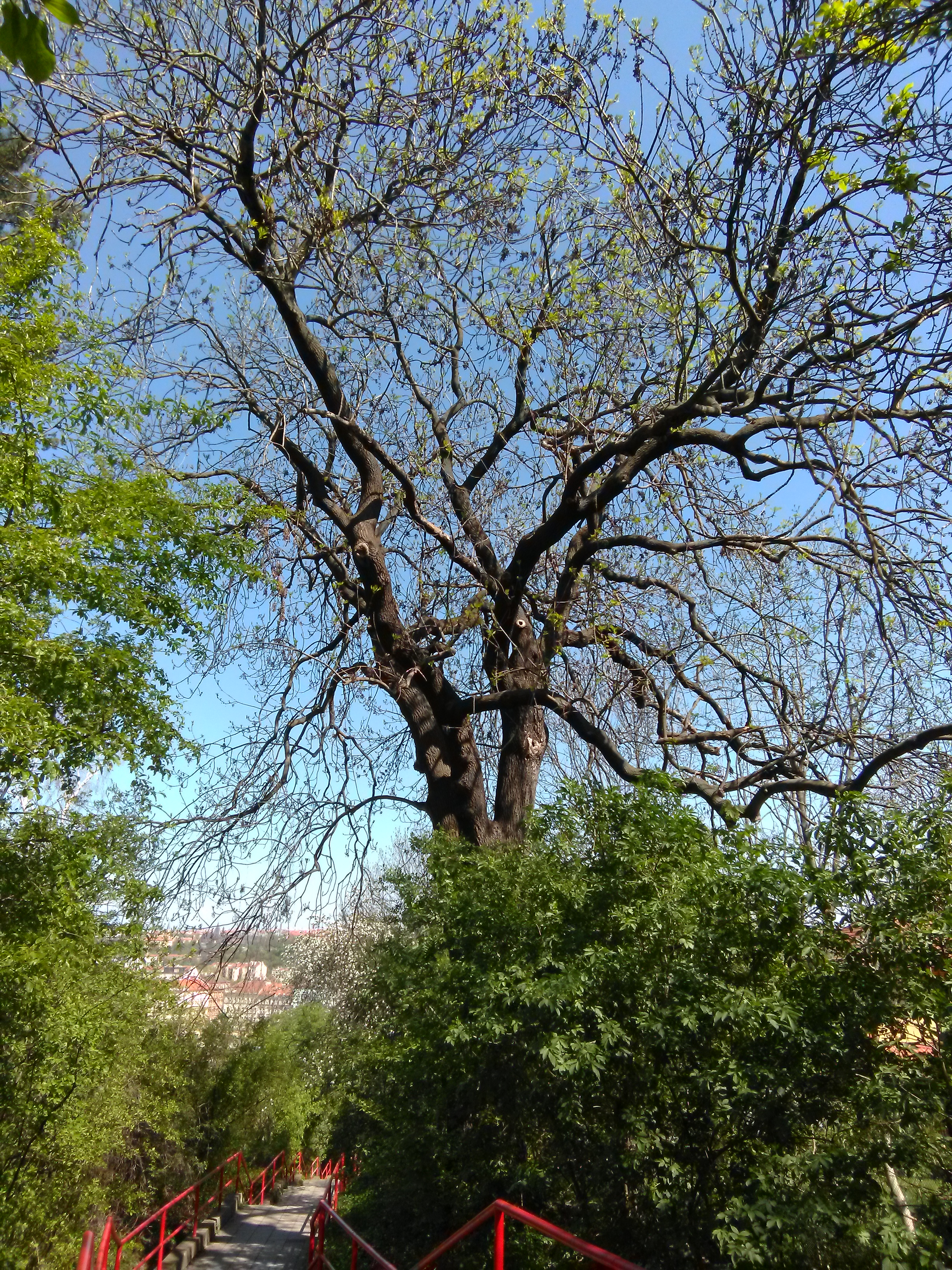 Jasan ztepilý (Fraxinus excelsior). Praha 5 - Smíchov, Koulka. Vysazen kolem roku 1900. Významný strom, evidenční číslo MHMP: 9, v databázi od roku 2013.